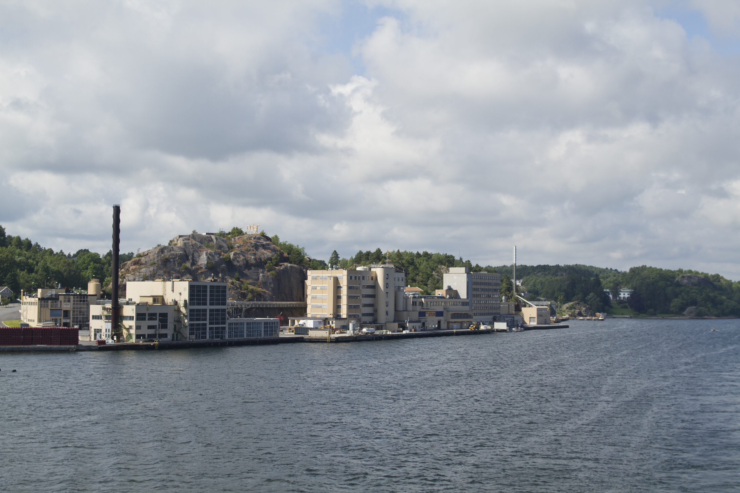 Jotun malingsfabrikk